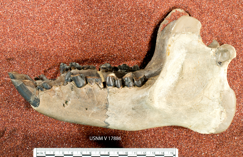 Trogosus hyracoides (Marsh)